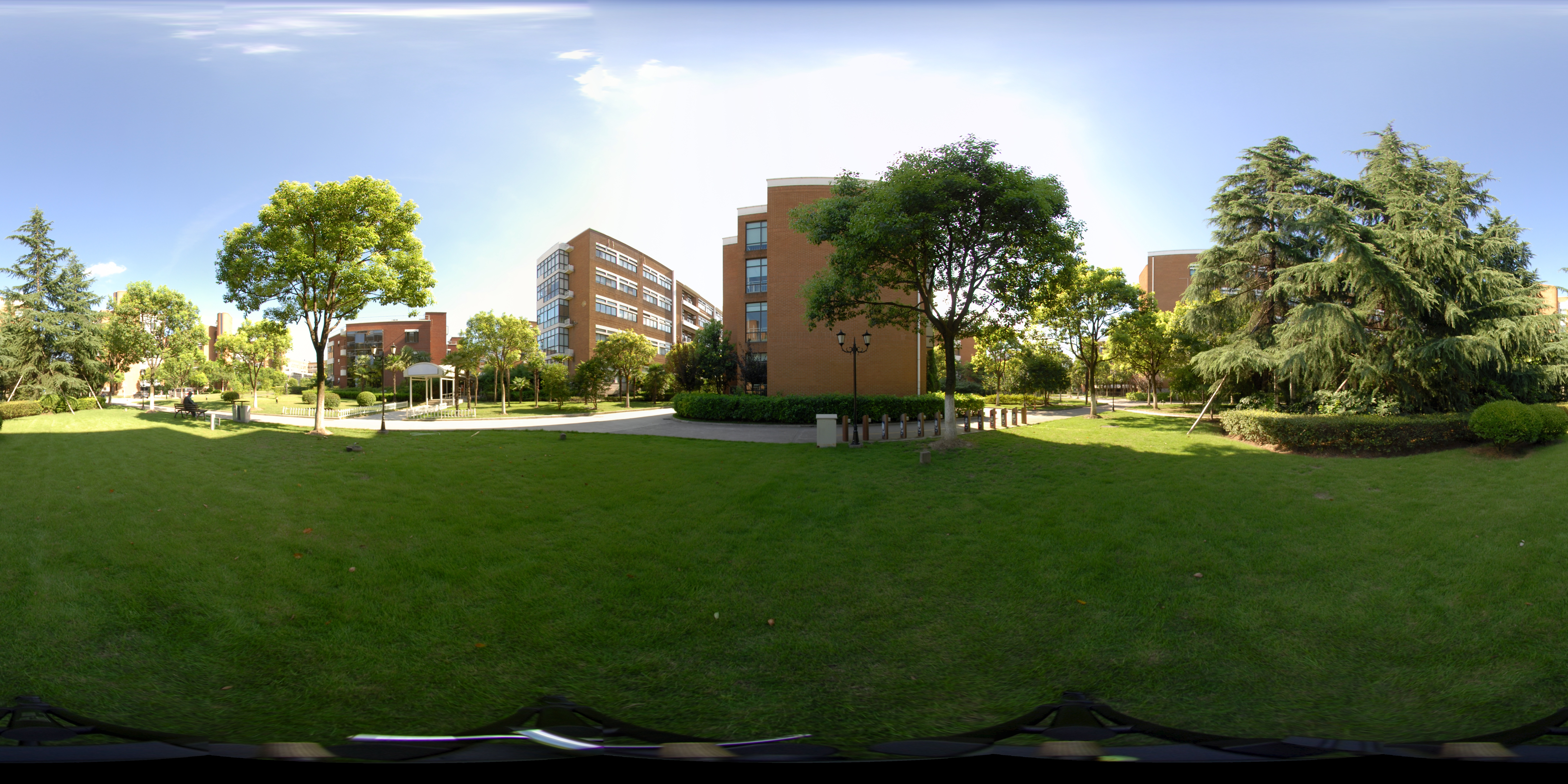 五枚の魚眼写真でつなぎ合わせたパノラマ写真です。